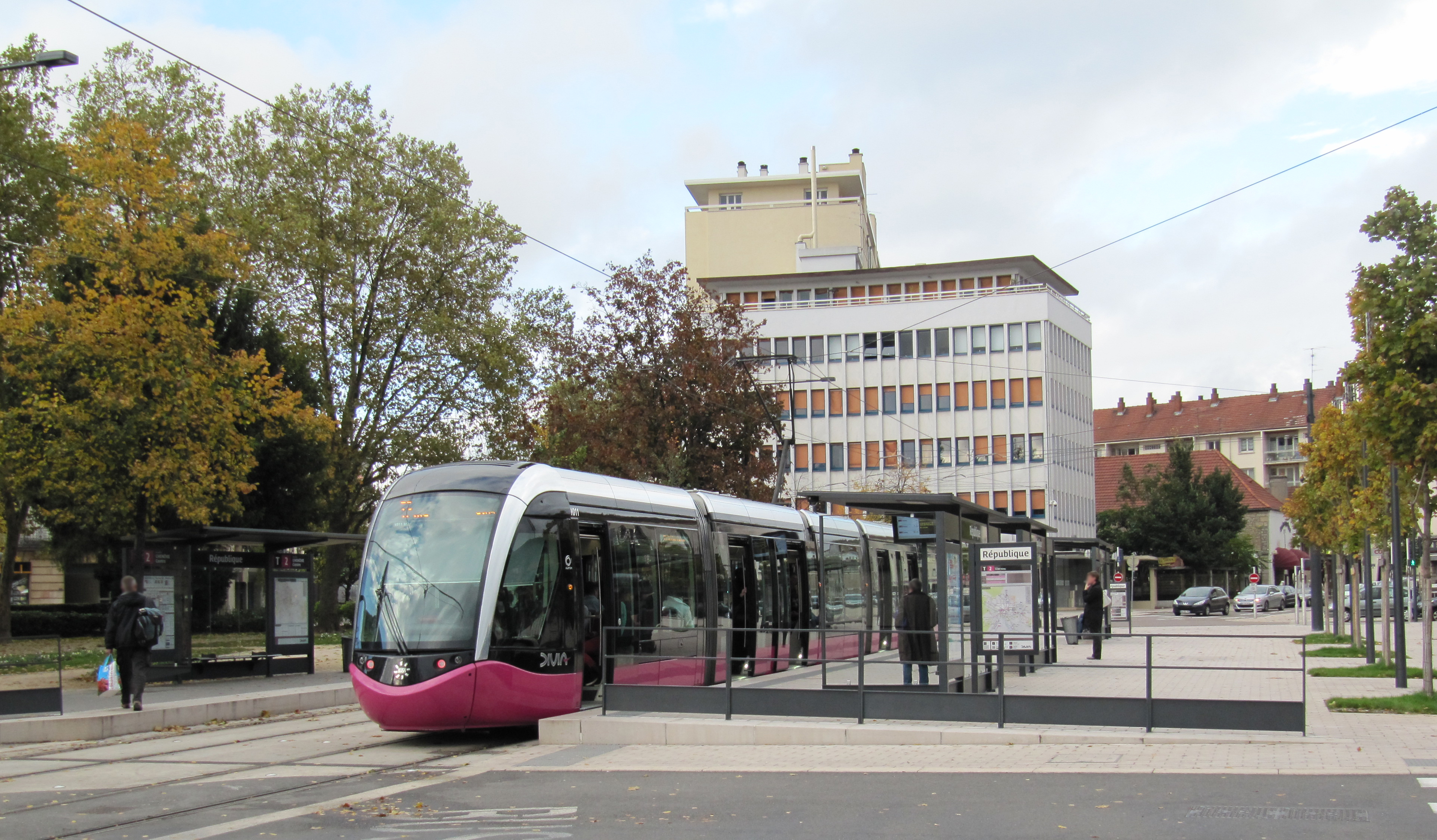 Tramway, ligne T2, Place de la République